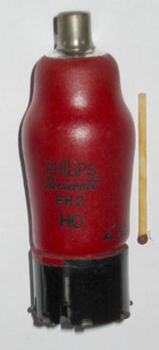 Fotografia heptody EH2